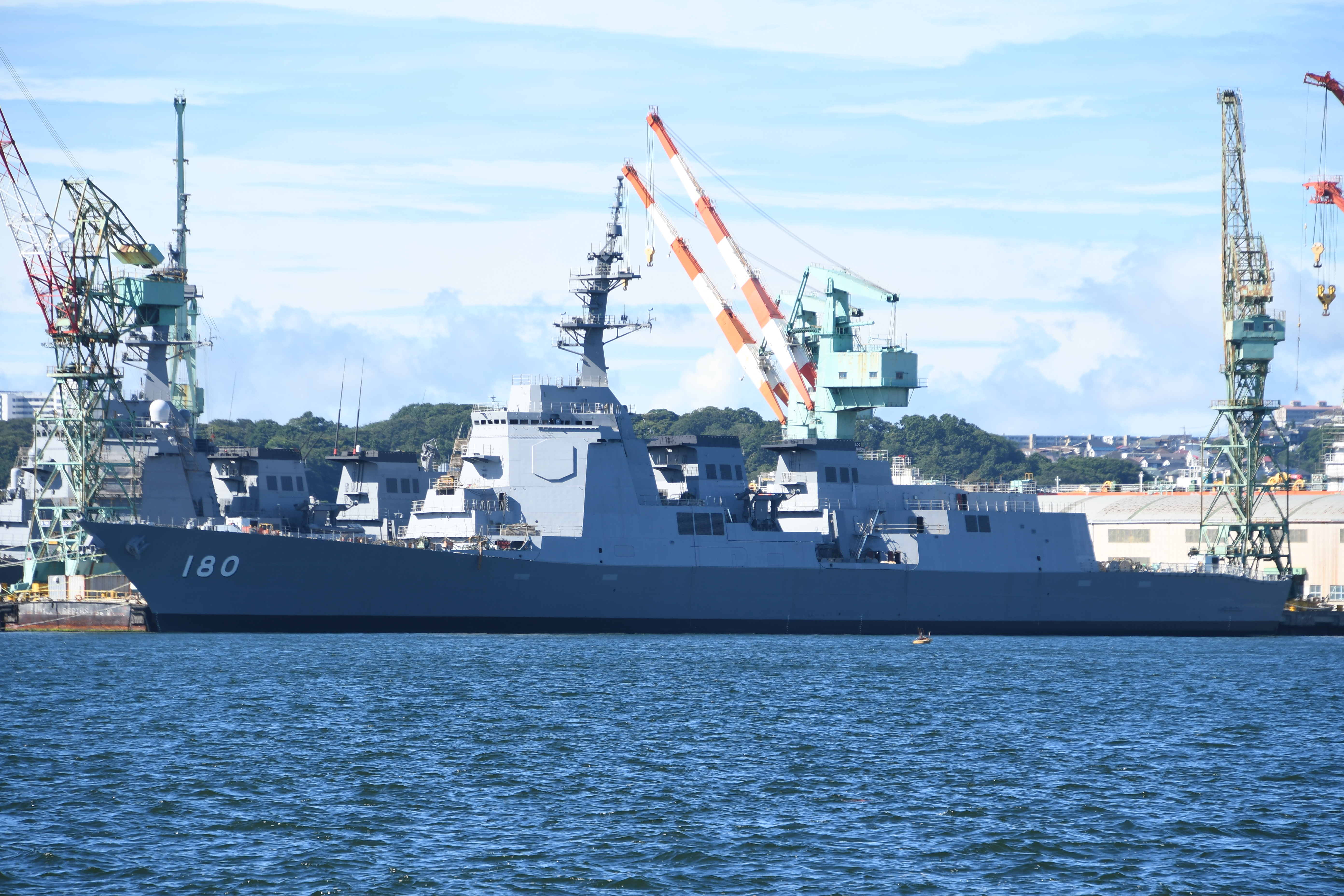 ジャパン マリンユナイテッド 横浜事業所にて建造中の海上自衛隊 ミサイル護衛艦はぐろ（DDG-180）。2019年7月26日 磯子火力発電所付近から撮影。